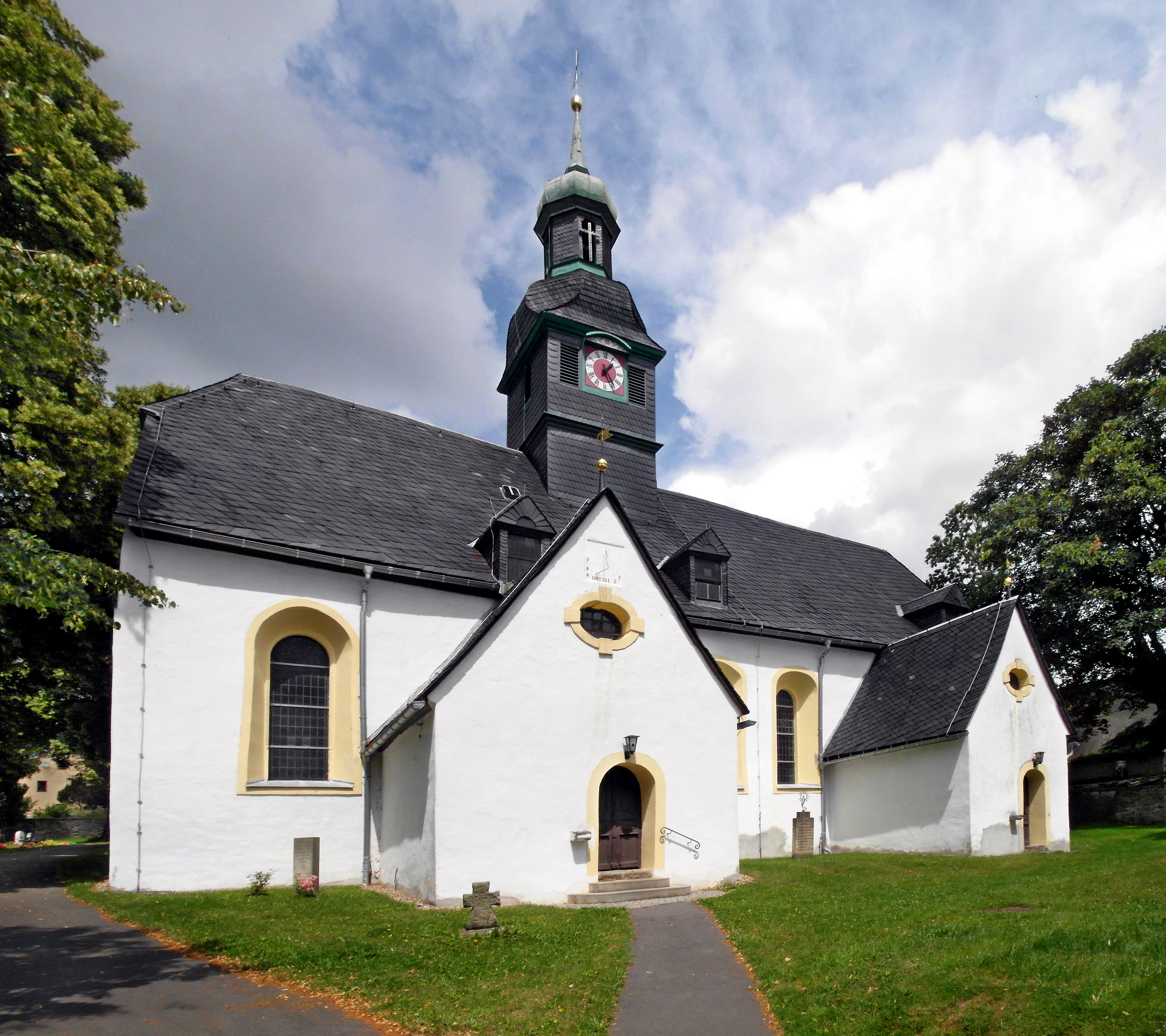 11.07.2018 09619 Helbigsdorf (Mulda): Evangelische Dorfkirche, Hauptstraße (GMP: 50.811503,13.365515). Spätgotik aus dem 14./15. Jahrhundert, 1576 und 1726 erweitert. Die Turmuhr geht auf das Jahr 1580 zurück. Überwiegend barocke Ausstattung. Sicht von Südwesten, Eingangsseite. [SAM6691+94+96+99.JPG]20180711300MDR.JPG(c)Blobelt